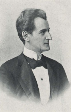 Königl. Kapellmeister Dr. Carl Muck